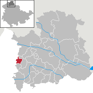 Gemeinde Kleinbodungen in Thüringen, Landkreis Nordhausen